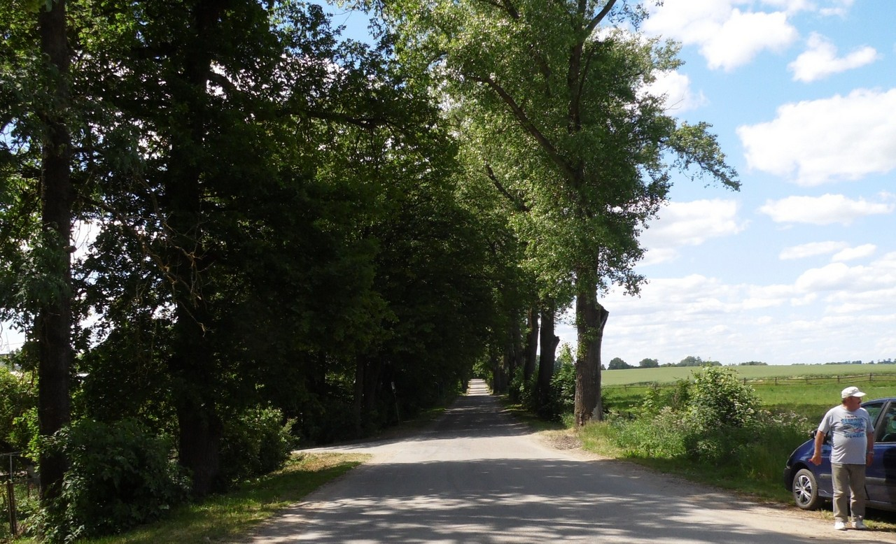 DROGA LOKALNA.